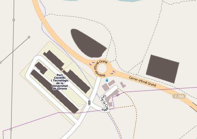 Mapa del Parc Científic i Tecnològic de la Universitat de Girona. This map may be incomplete, and may contain errors. Don't rely solely on it for navigation.